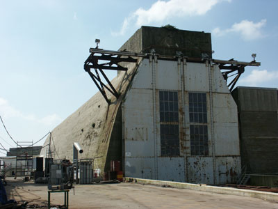 Lorient/Frankreich: Westlicher Dombunker